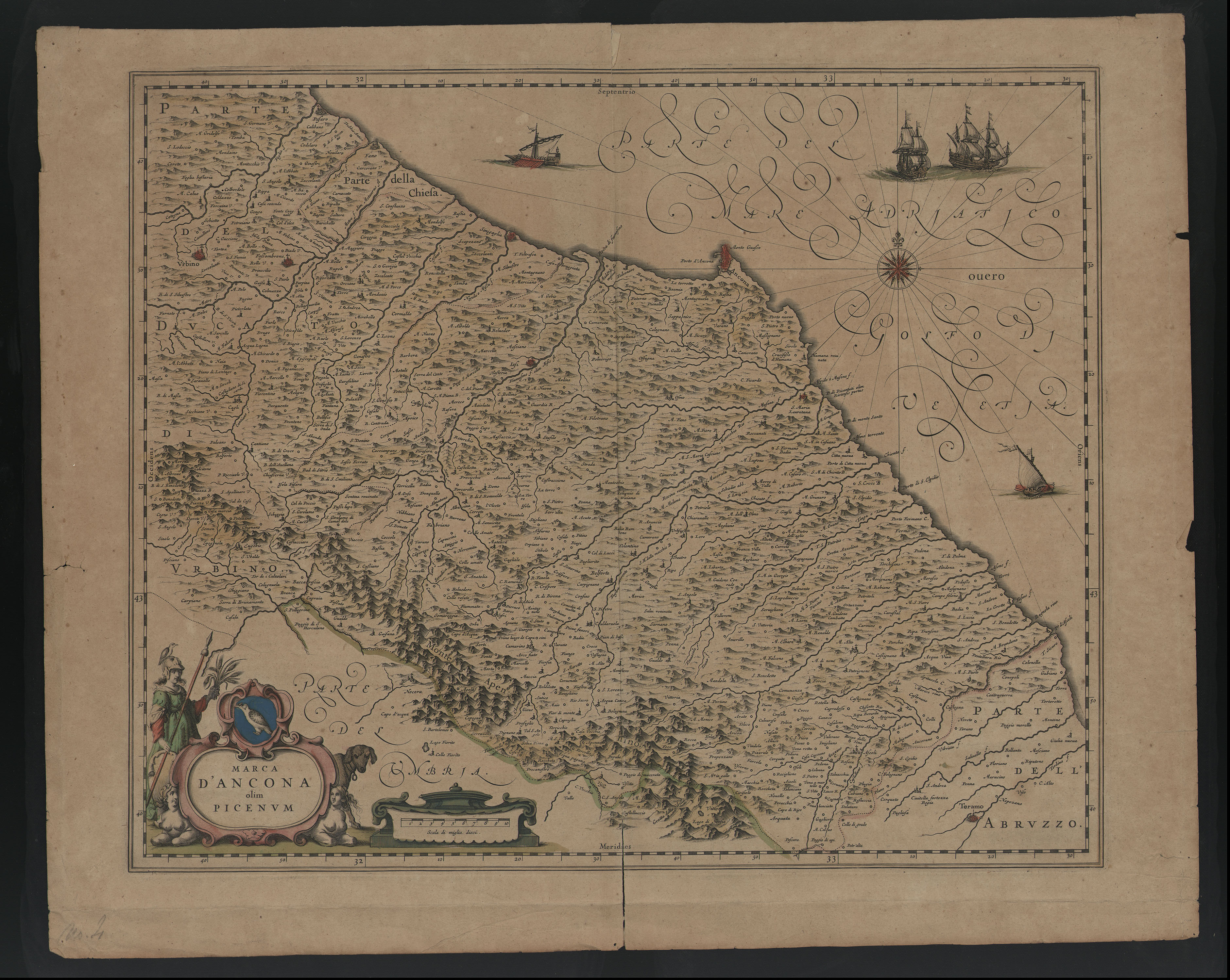 Marca d'Ancona. Amsterdam: W. J. Blaeu, 1635-1662. Scala 1:320000. Incisione a bulino su rame, colorata, 501x595 f., 419x507 l., 416x503 s. Recto e verso.